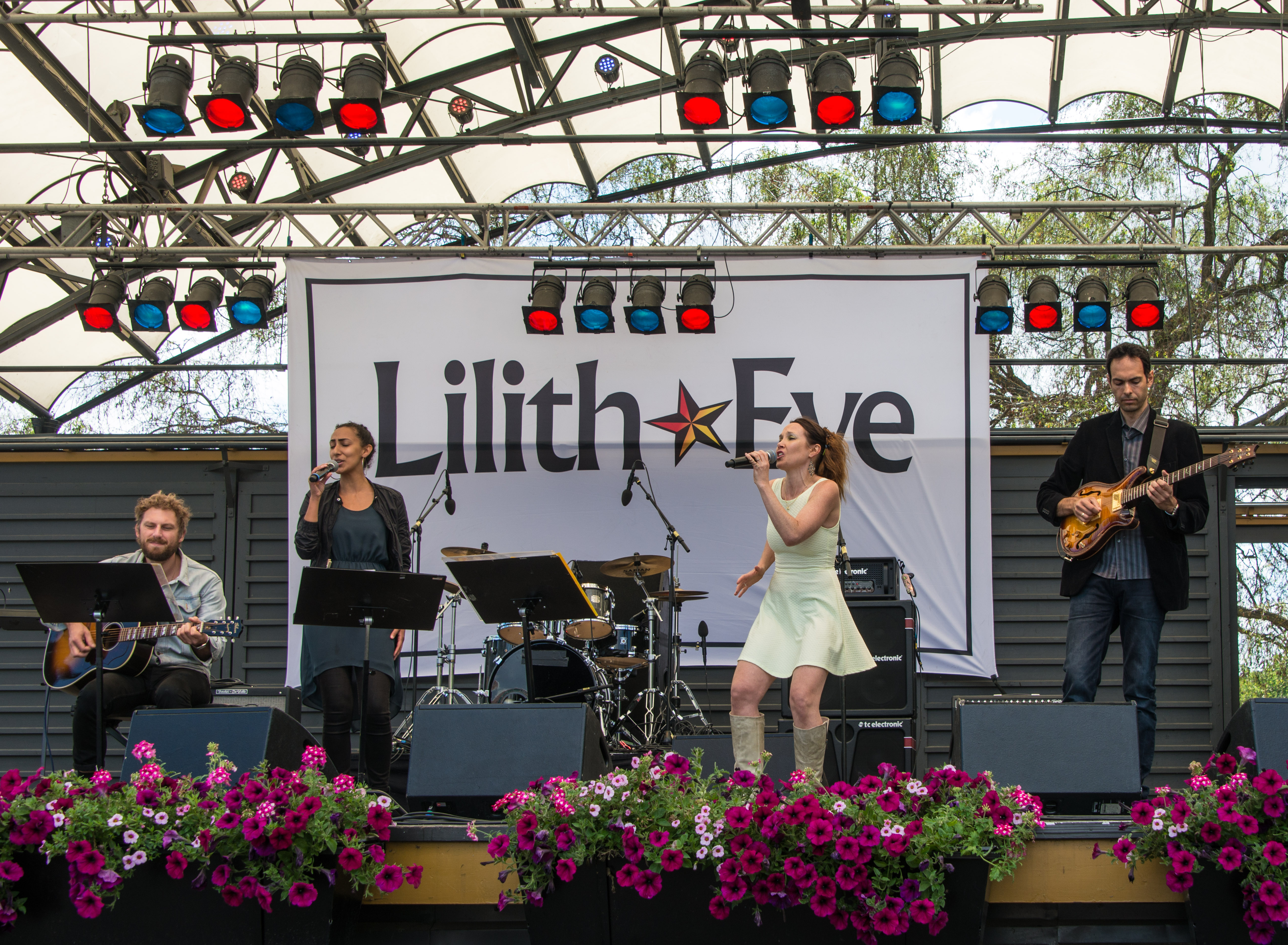 Jenny Holmgren på musikfestivalen Lilith Eve i Kungsträdgården i Stockholm den 11 juli 2015.